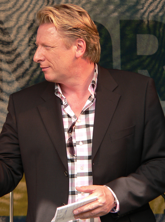 Ludger Abeln